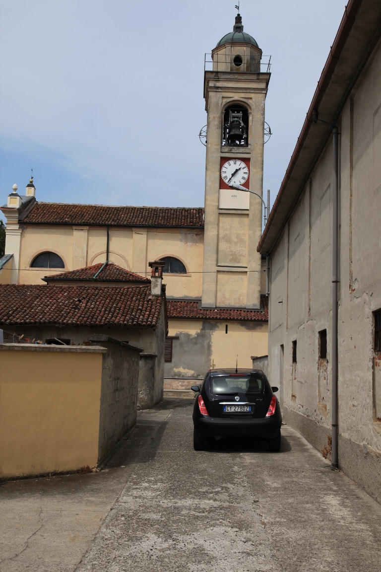 Badia Pavese 08/2010